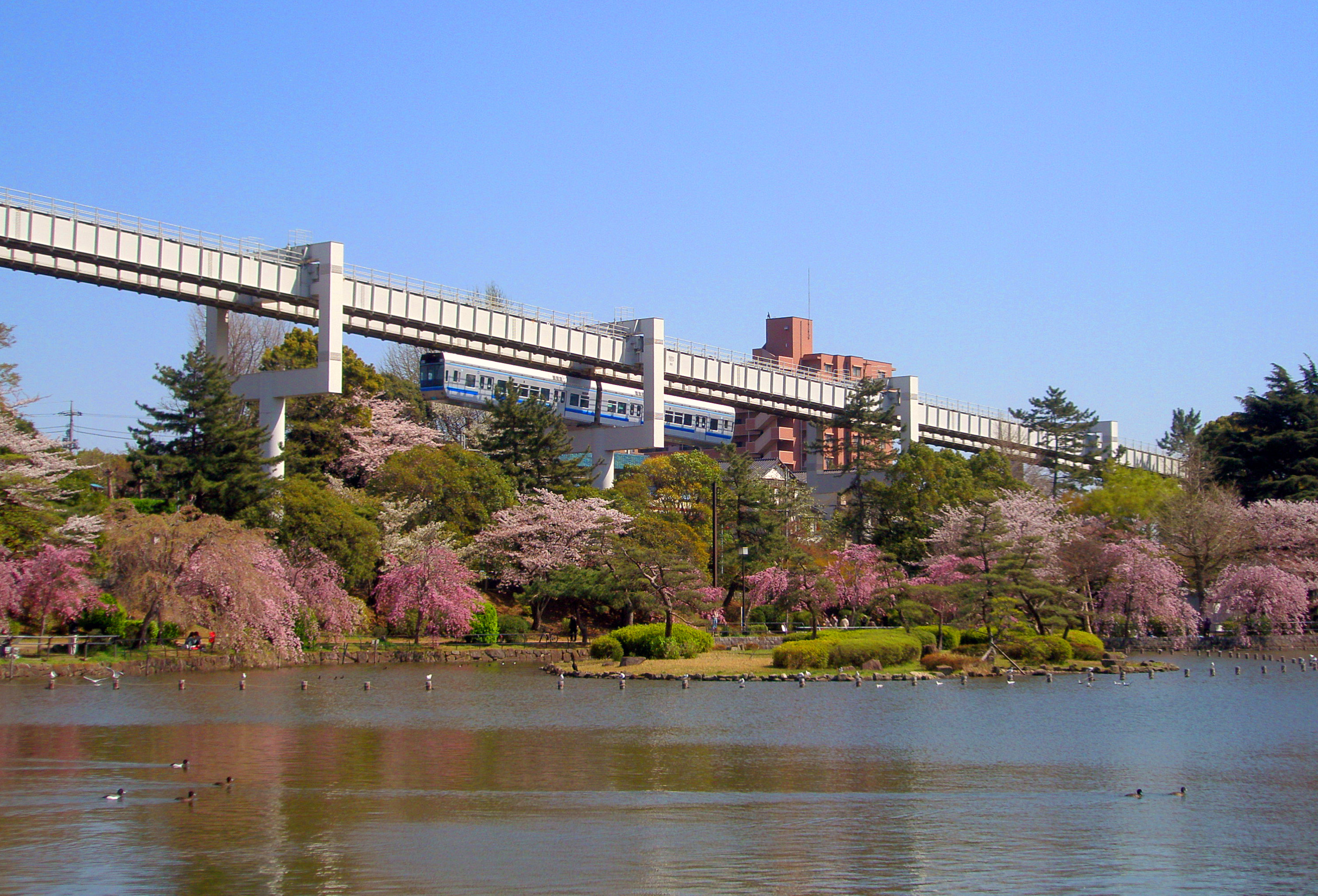 千葉公園綿打池とモノレール